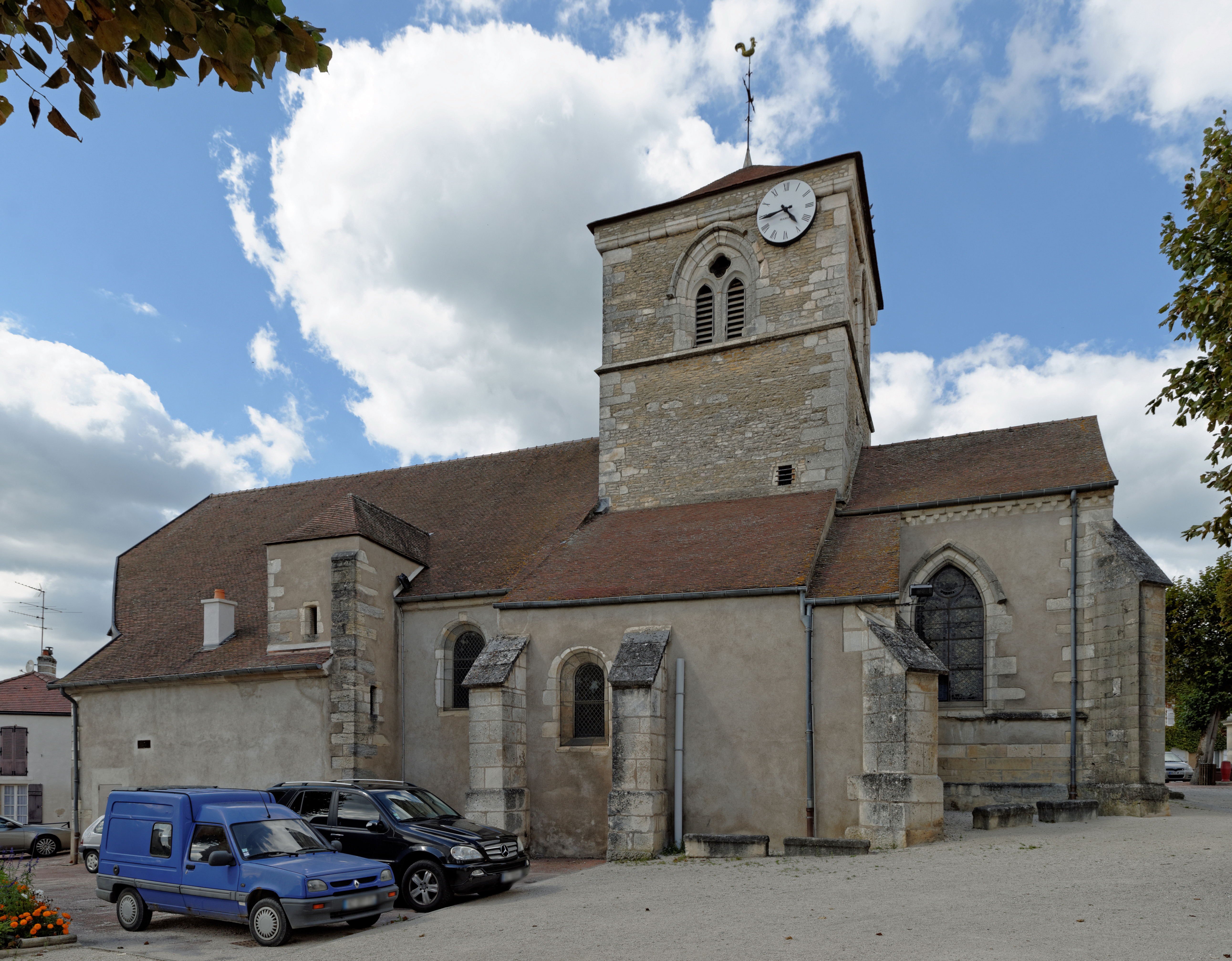 Église Saint-Vallier à Messigny et Vantoux (Côte d'Or, France) .